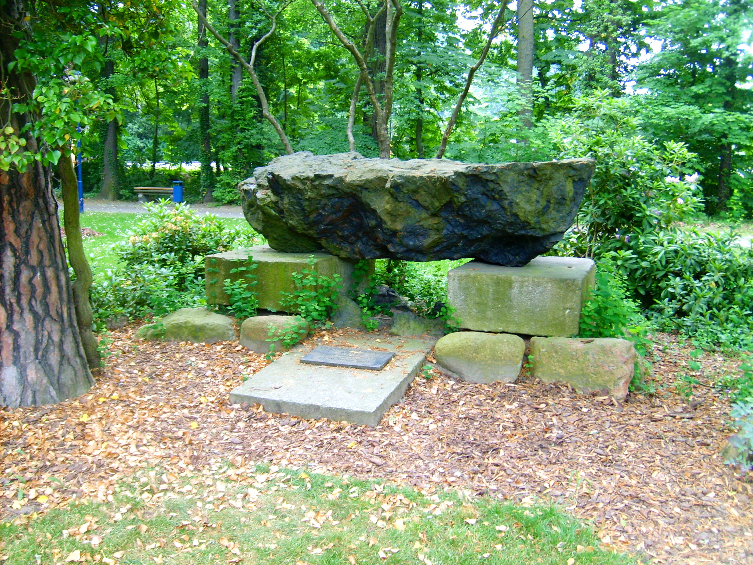 Borsdorfdenkmal in Bad Liebenwerda